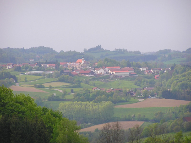 Konzell